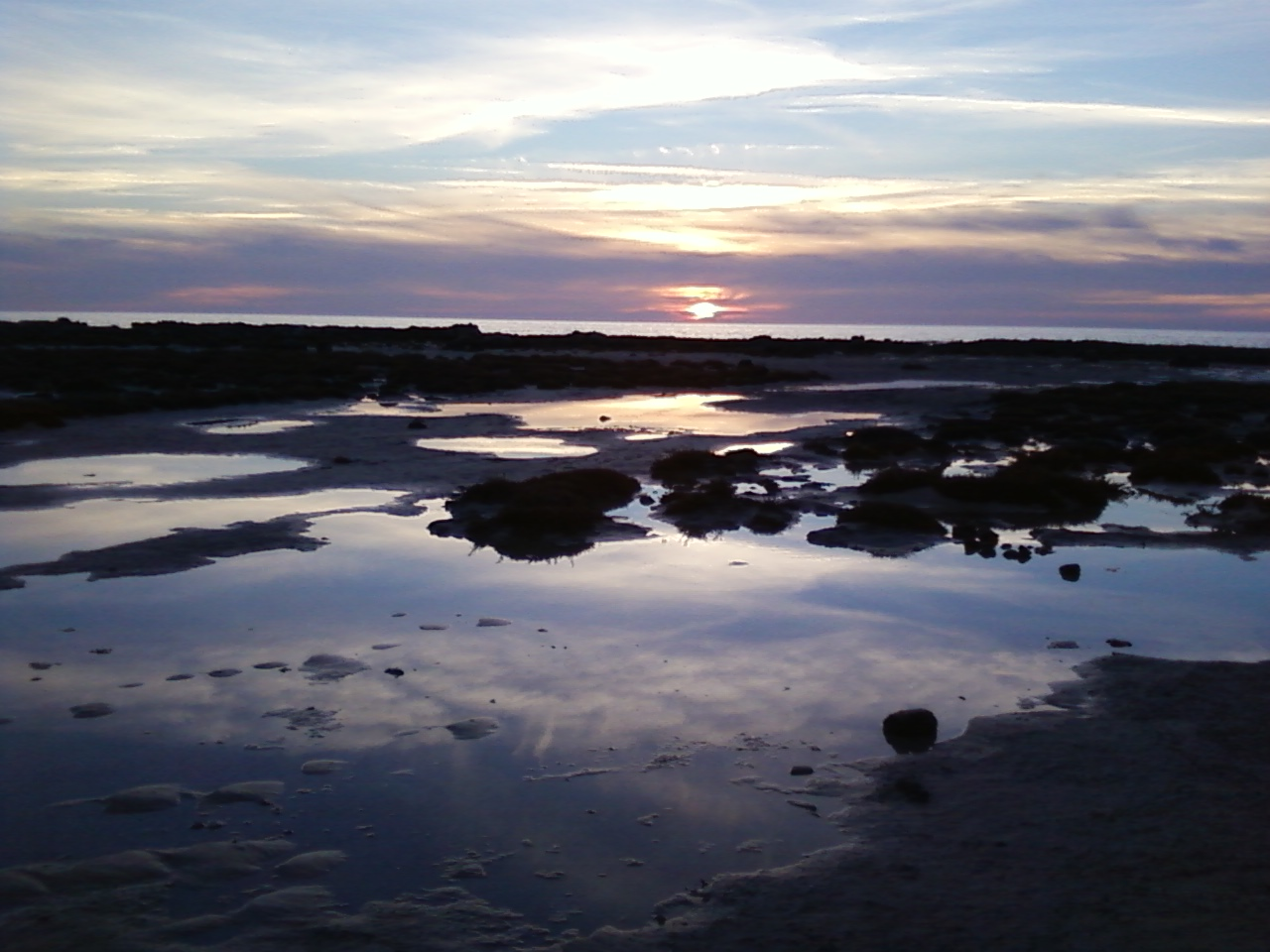 palude alla strea